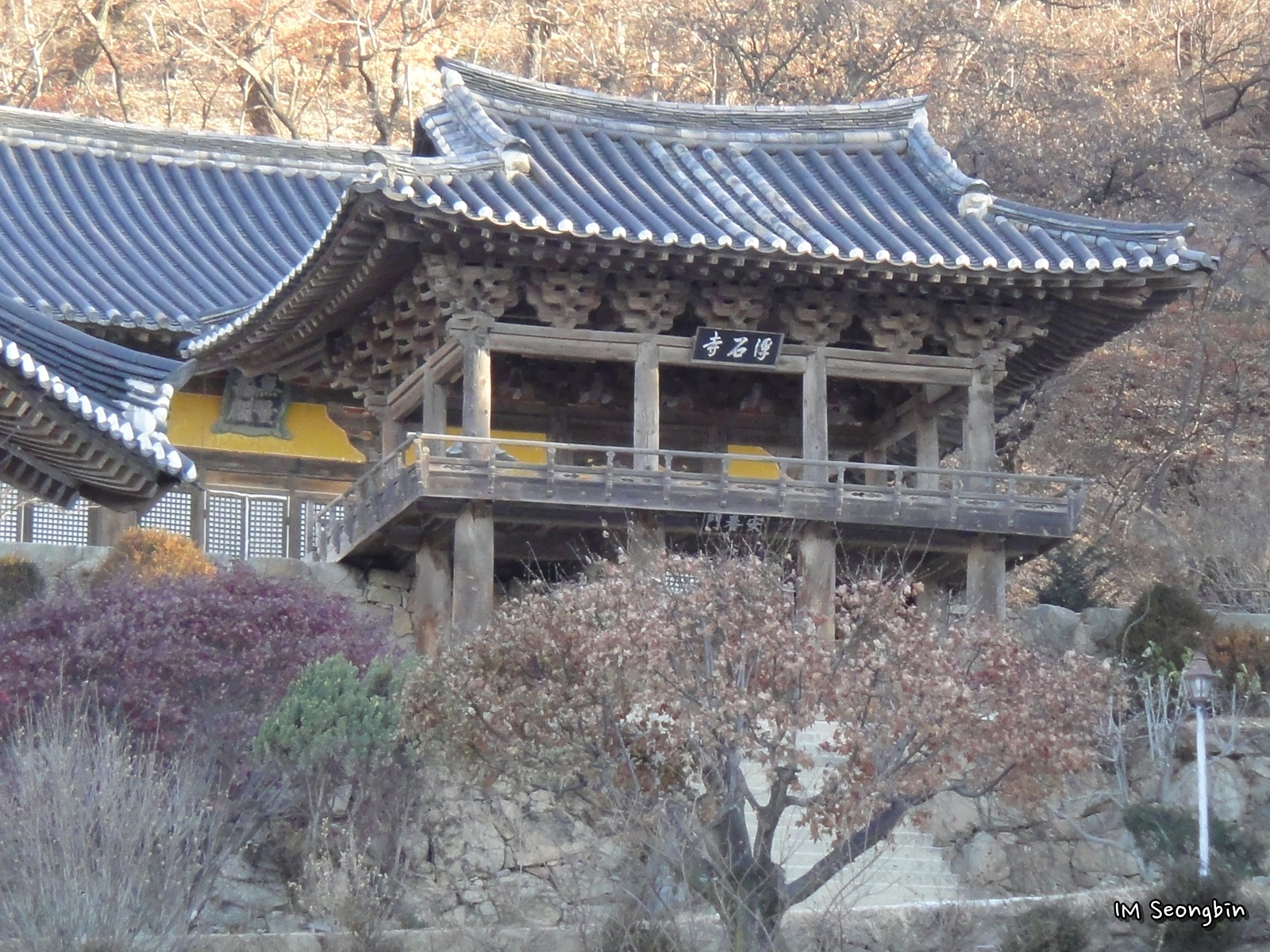 Anyangnu, Buseoksa, Yeongju (영주 부석사 안양루)